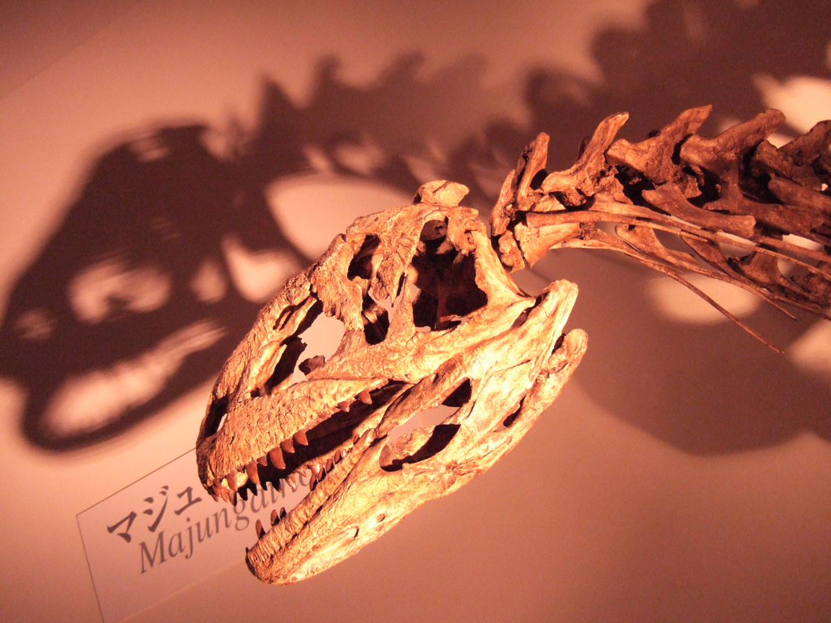 Majungasaurus in Japan.